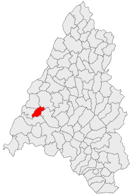 Categorie:Hărţi ale judeţului Bihor